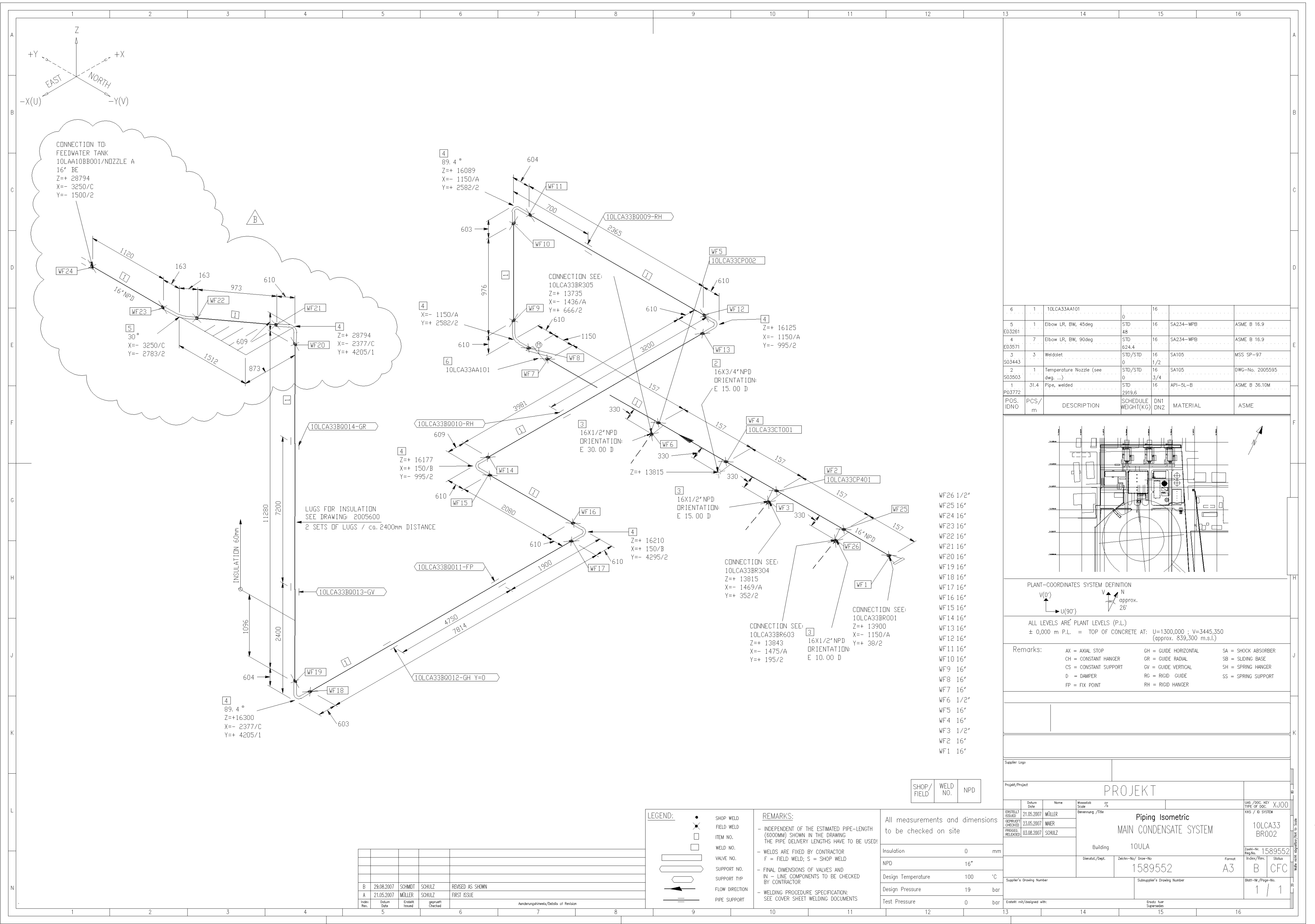 Isometrie einer Kraftwerksrohrleitung mit Revisionswolke